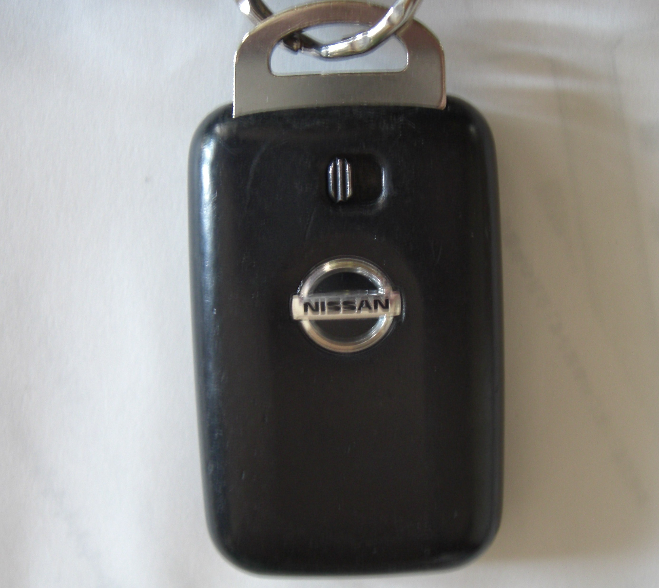 Intelligent key(NISSAN CUBE)